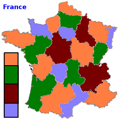 Illustration des Vier-Farben-Theorems anhand der Regionen Frankreichs